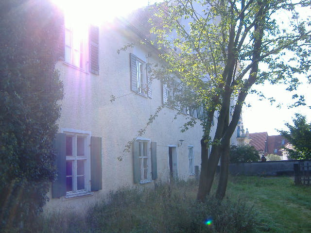 Unterliezheim